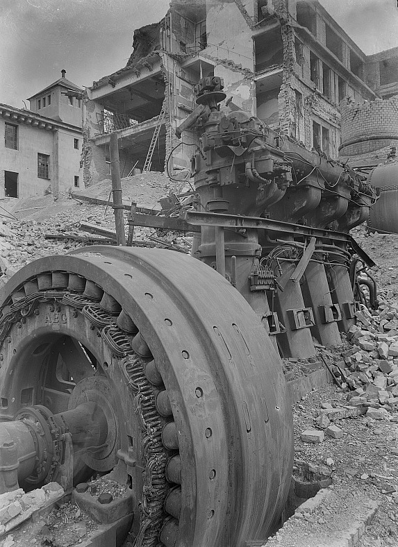 Original image description from the Deutsche FotothekZerstörte Gebäude und Anlagen der Verpackungs- und Zigarettenmaschinenfabrik "Universelle"